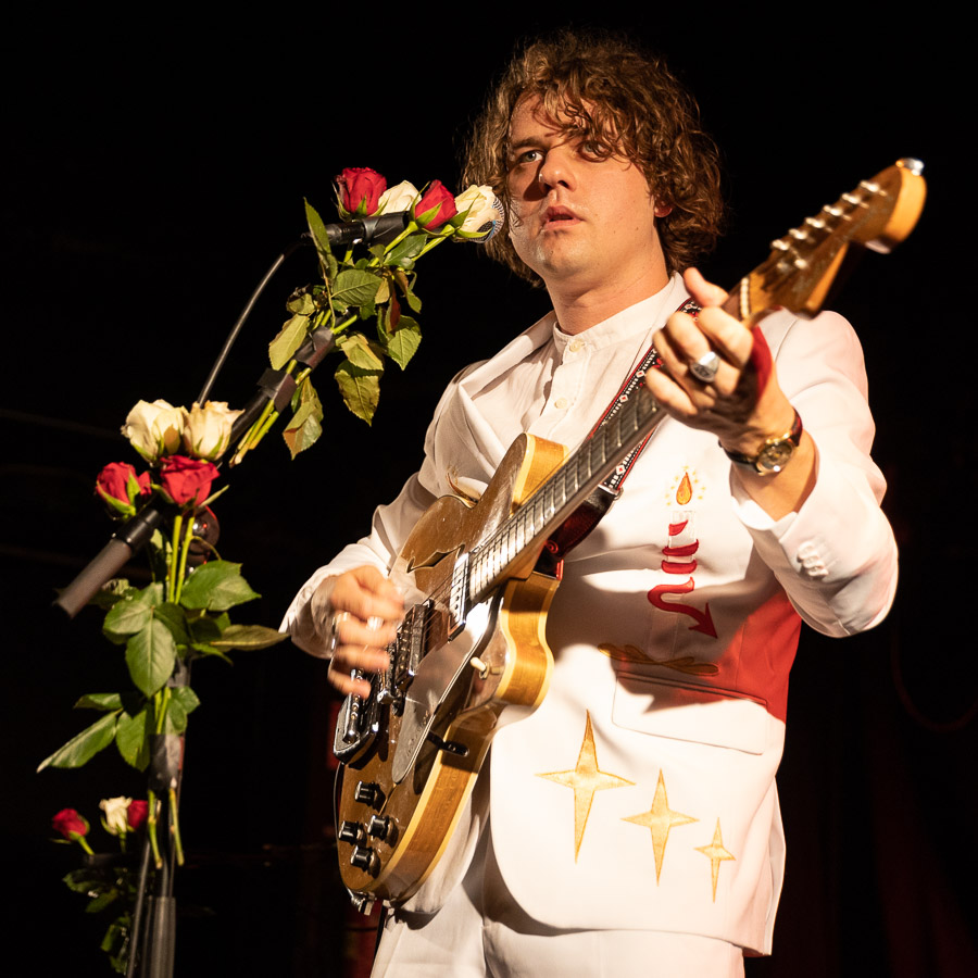 Den amerikanske artisten Kevin Morby på scenen på John Dee i Oslo 30. juni 2019.